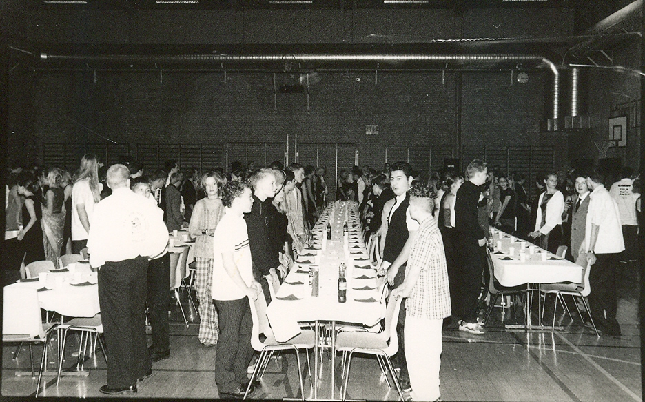 I efteråret 2000 afholdt elevorganisationerne Folkeskoleelevernes Landsorganisation og Danmarks Elev Organisation deres første fælles stormøde i Løsning kaldet ÅMEK 2000 som en sammentrækning af ÅrsMøde (DEO) og ElevKonference (FLO).